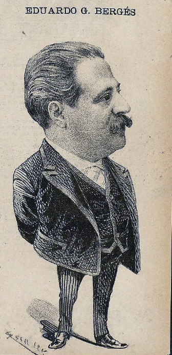 Eduardo G Bergés.